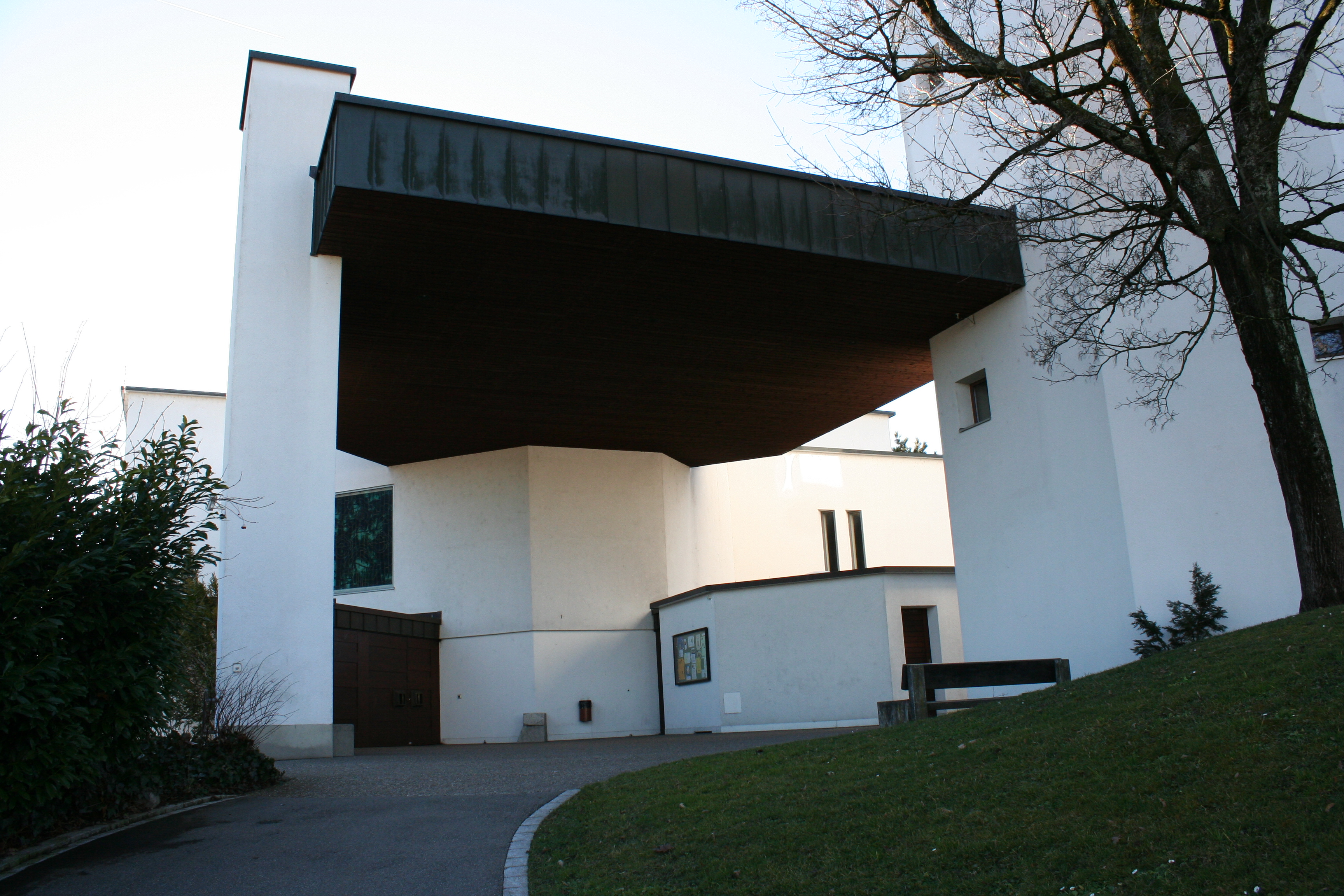 Römisch-katholische Pfarrikirche St. Niklaus Hombrechtikon, Aussenansicht von Osten